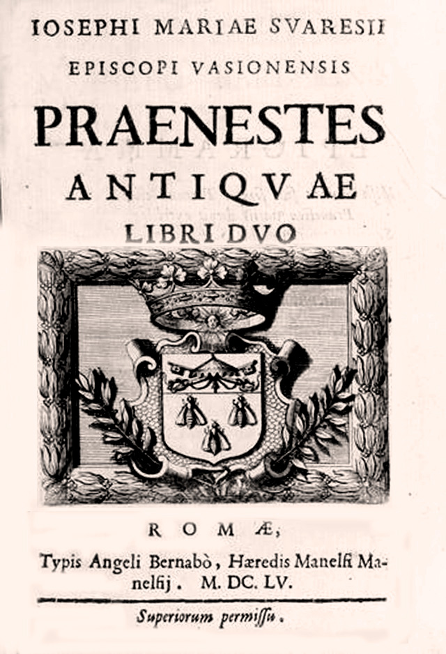 Praenestes antiquae Livre II de Joseph Marie de Suarès, évêque de Vaison